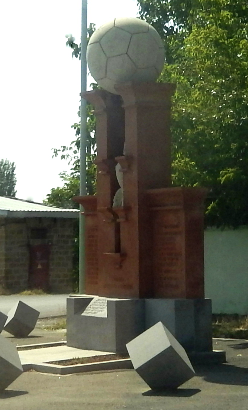 «Արարատ-73»-ի 40-ամյակի հուշարձան (Ագարակ)